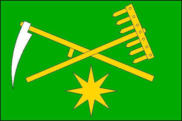 Česky: vlajka obce Komárov